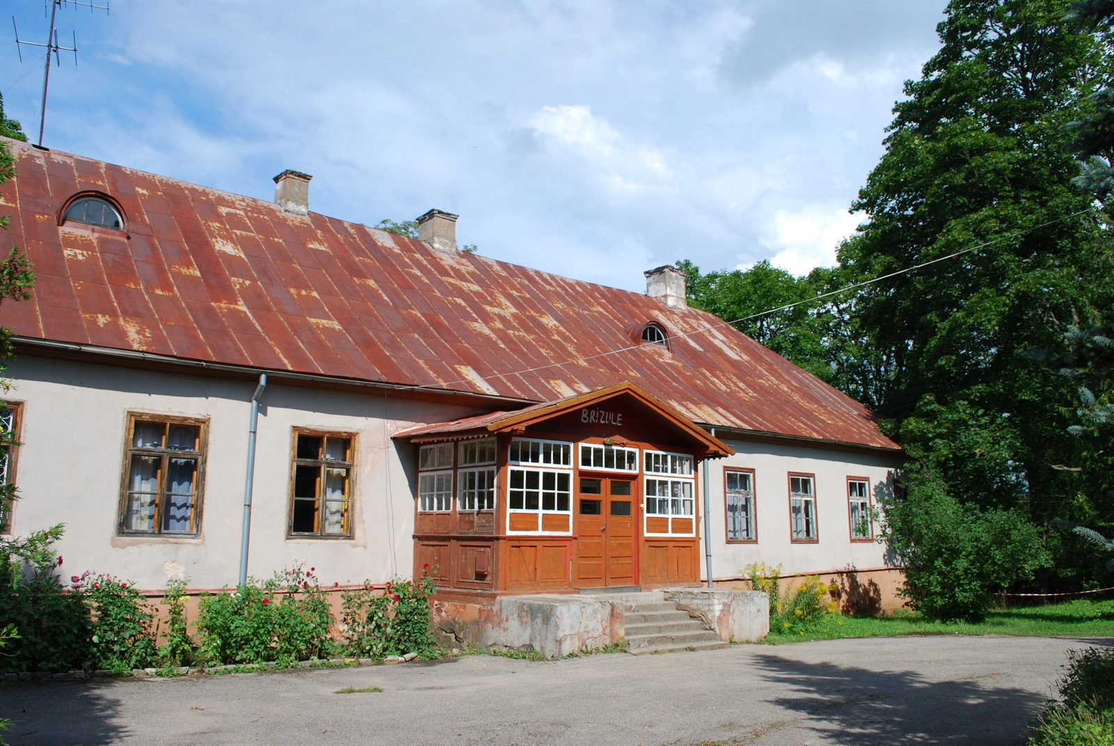 Brizules muiža